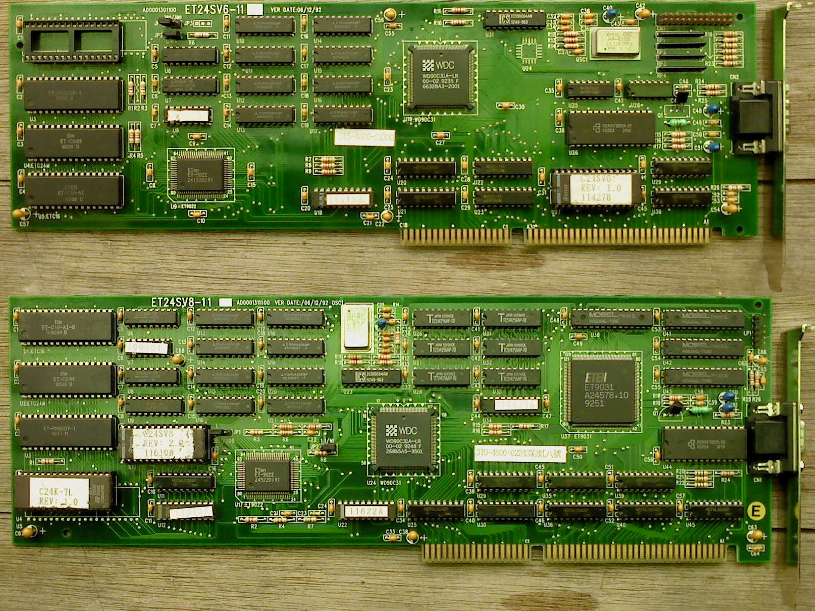 倚天中文系統硬體卡，彩虹六號與彩虹八號(1993)